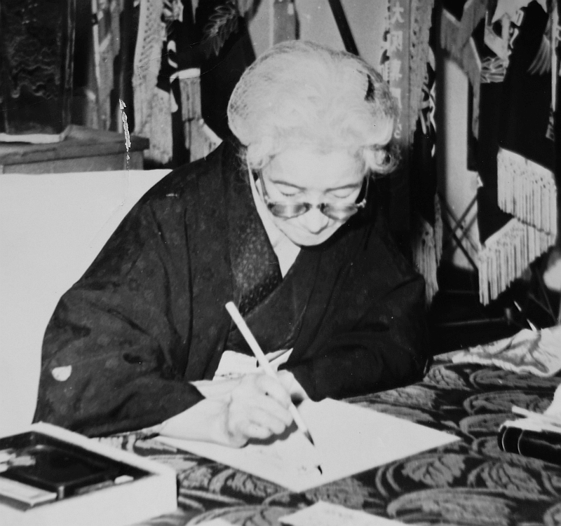 晩年、色紙に向かう柳原白蓮 撮影 楢崎浅太郎（教育心理学者、大学教授、学校経営 1881-1974） アップロード Asacyan（浅太郎が曾祖伯父、形見として所蔵） 浅太郎は、東京で歌仲間として長く親しくしていた（著書では「敬いつつも 親しみ深かった友」と表現している）白蓮へ、自身が常に感じていた 「人間と自然、世界の平和と幸せ」についての信念を、31文字の和歌にして ほしいと頼んでいたところ、1年半後、わざわざ自宅まで持参してくれたと 手記に残しています。 その時書かれた歌や、長男の戦死を詠んだものなど、数点の自筆が浅太郎の 形見としてあるのですが、色紙の掲載は、白蓮本人の著作権が切れていないと 思われるため、ウィキペディアへの公開は難しいのが現状です。